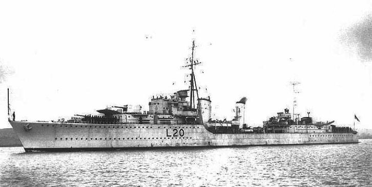 Der Zerstörer HMS Gurkha der Tribal-Klasse